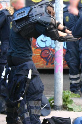 Politi med brynje